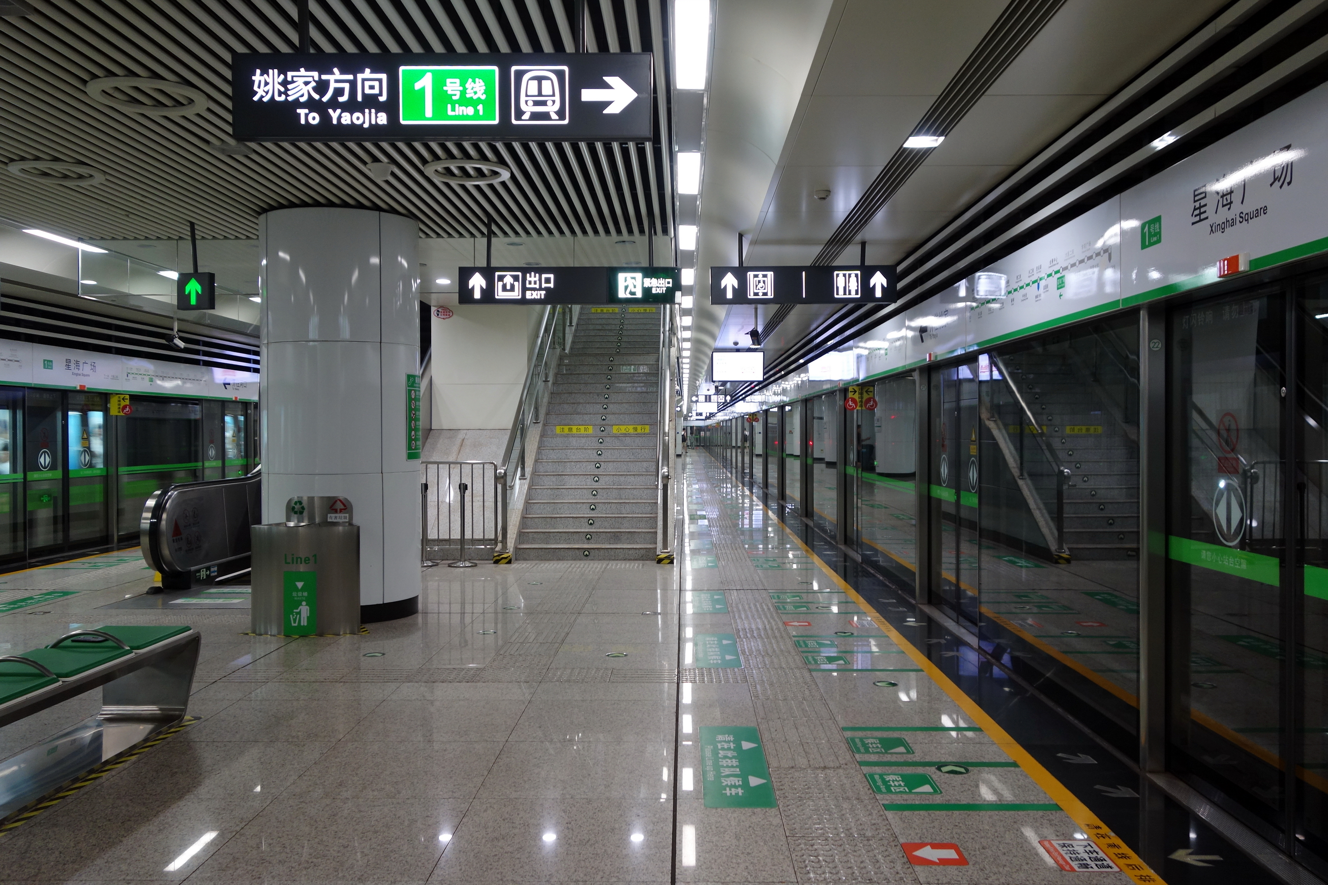 大连地铁1号线星海广场站